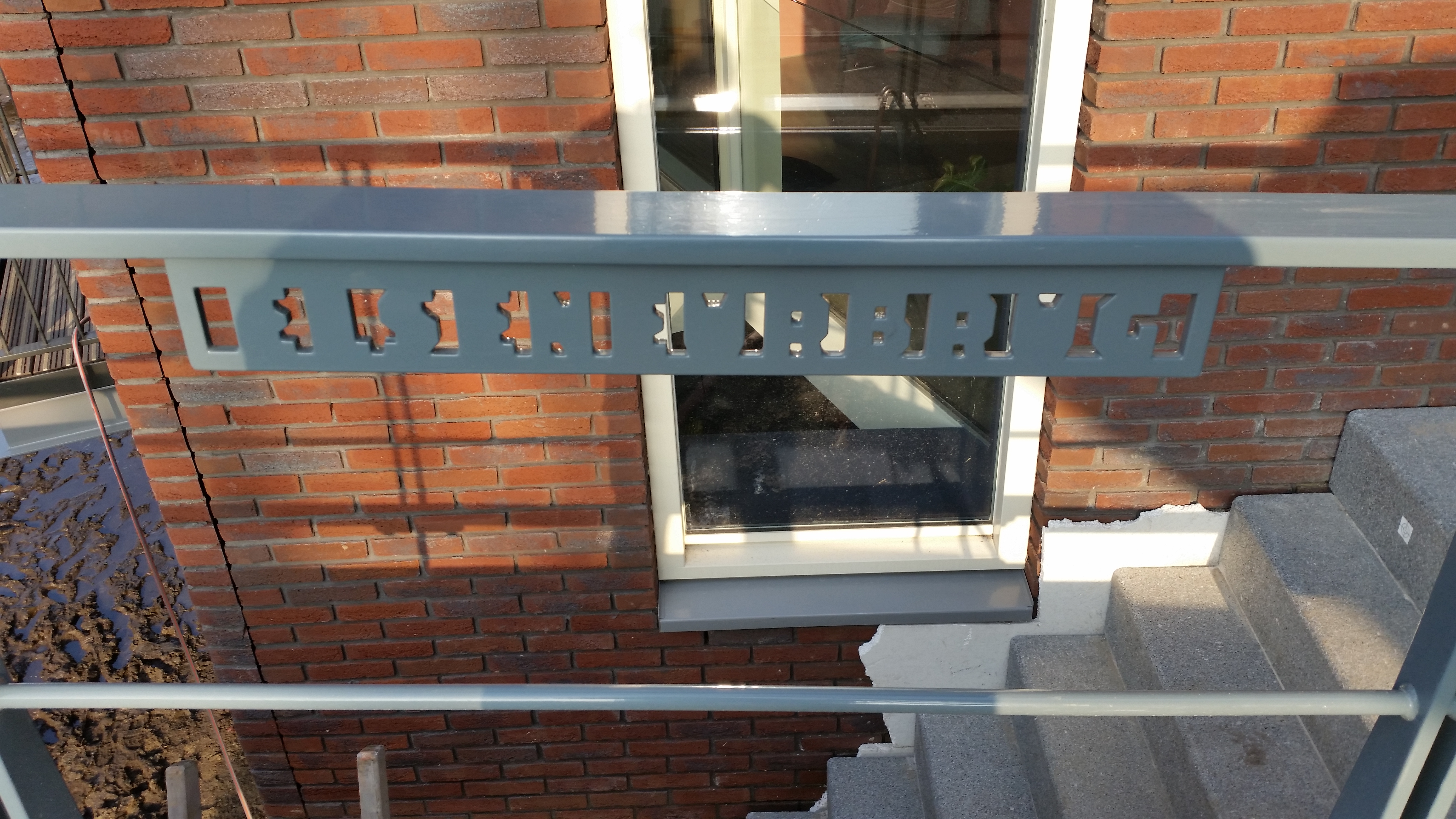 Naambord van de Elseneurbrug, Amsterdam